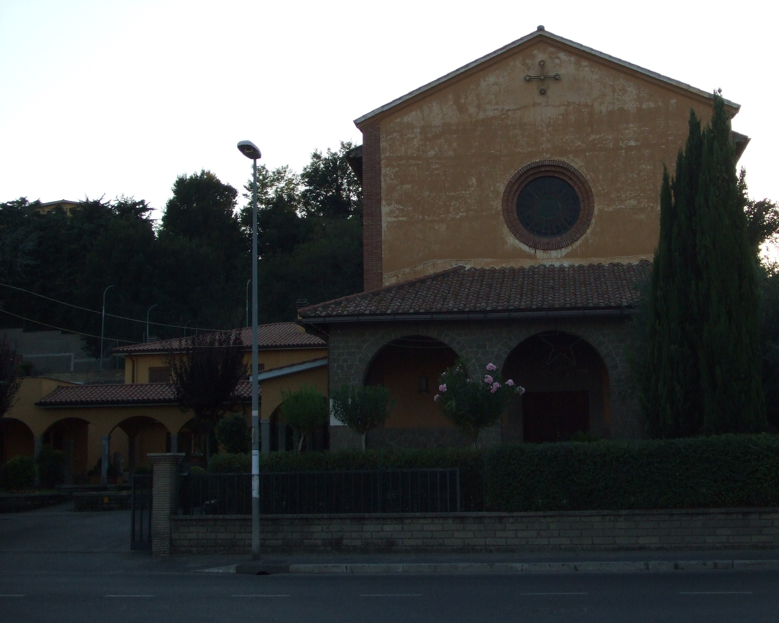 In via di Casal Selce. Sede della parrocchia omonima.